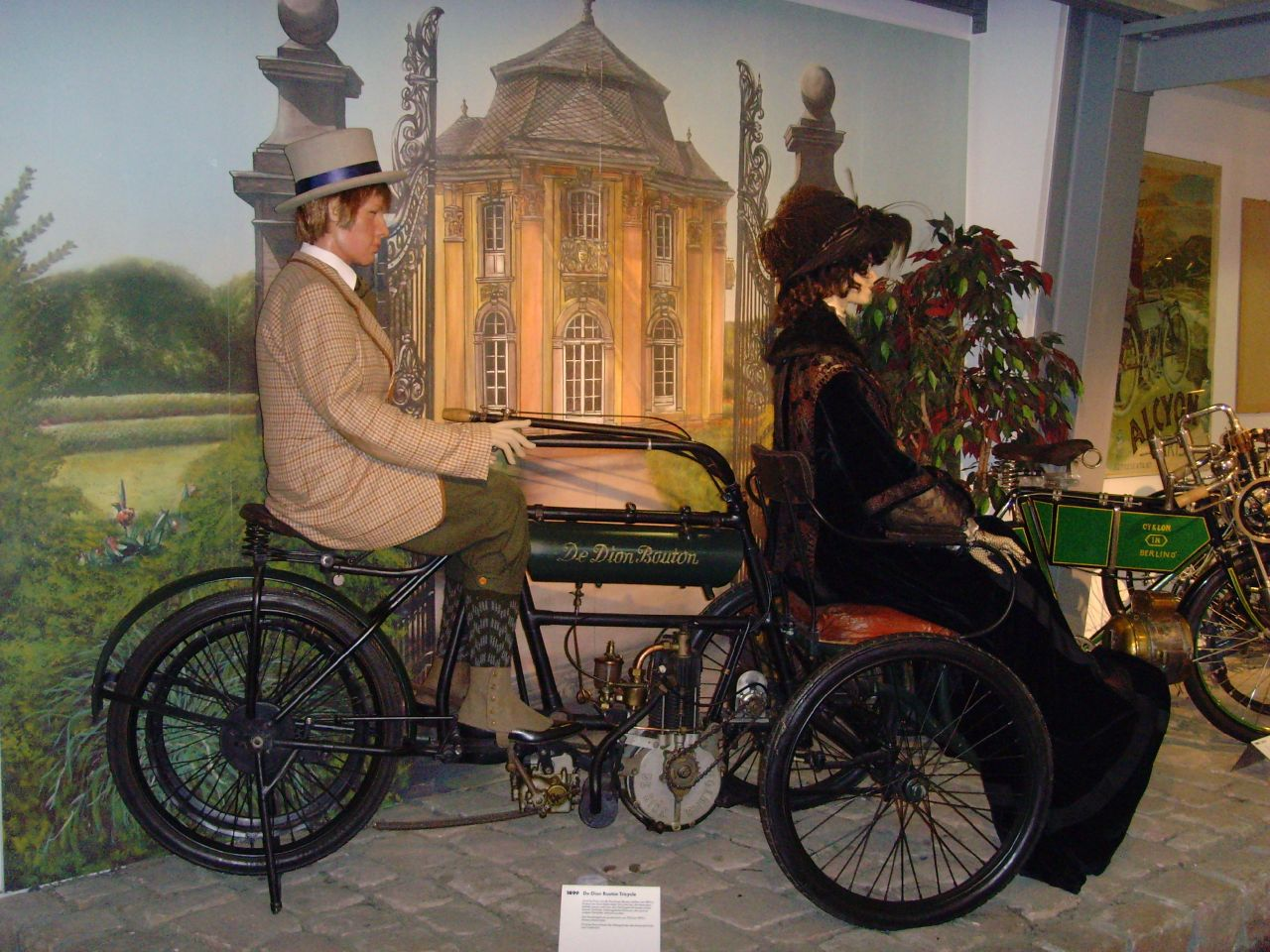 Deutsches Zweirad- und NSU-Museum Neckarsulm.